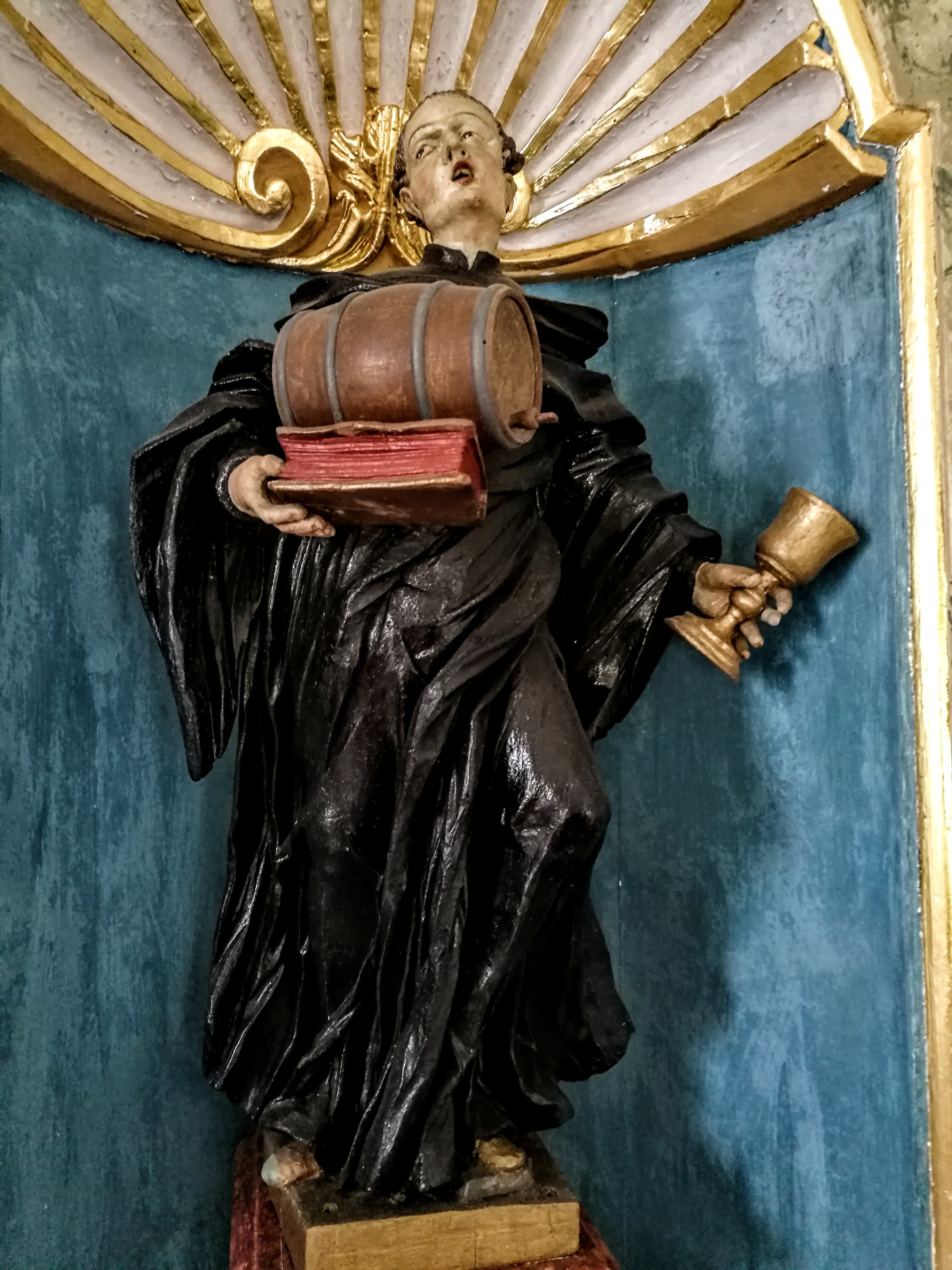 Deutschland (D) - Baden-Württemberg (BW) - Landkreis Konstanz (KN) - Mühlingen, Madachhof: Kapelle St. Otmar, St. Otmar